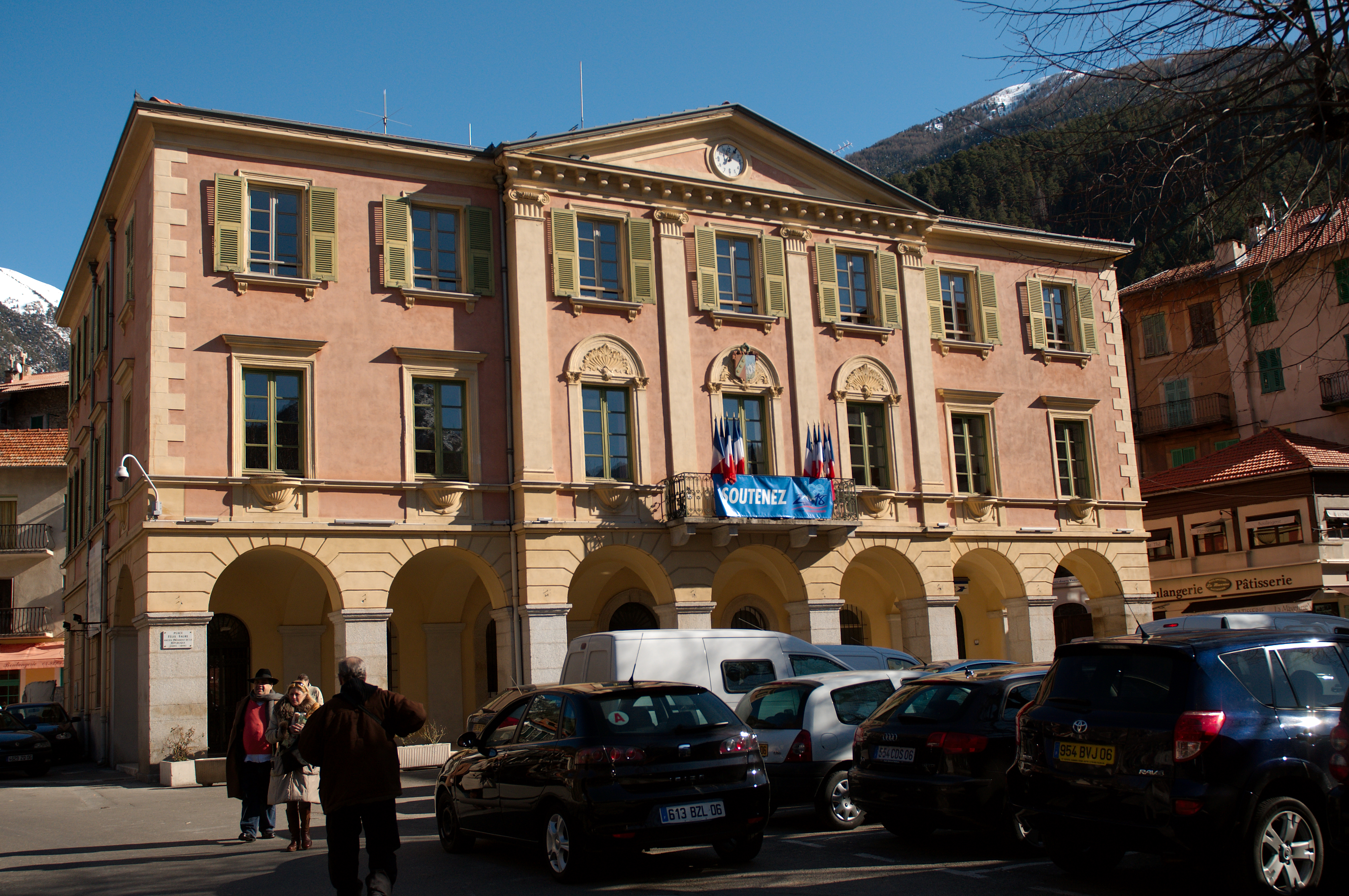 Hotel de ville de Saint-Martin-Vésubie